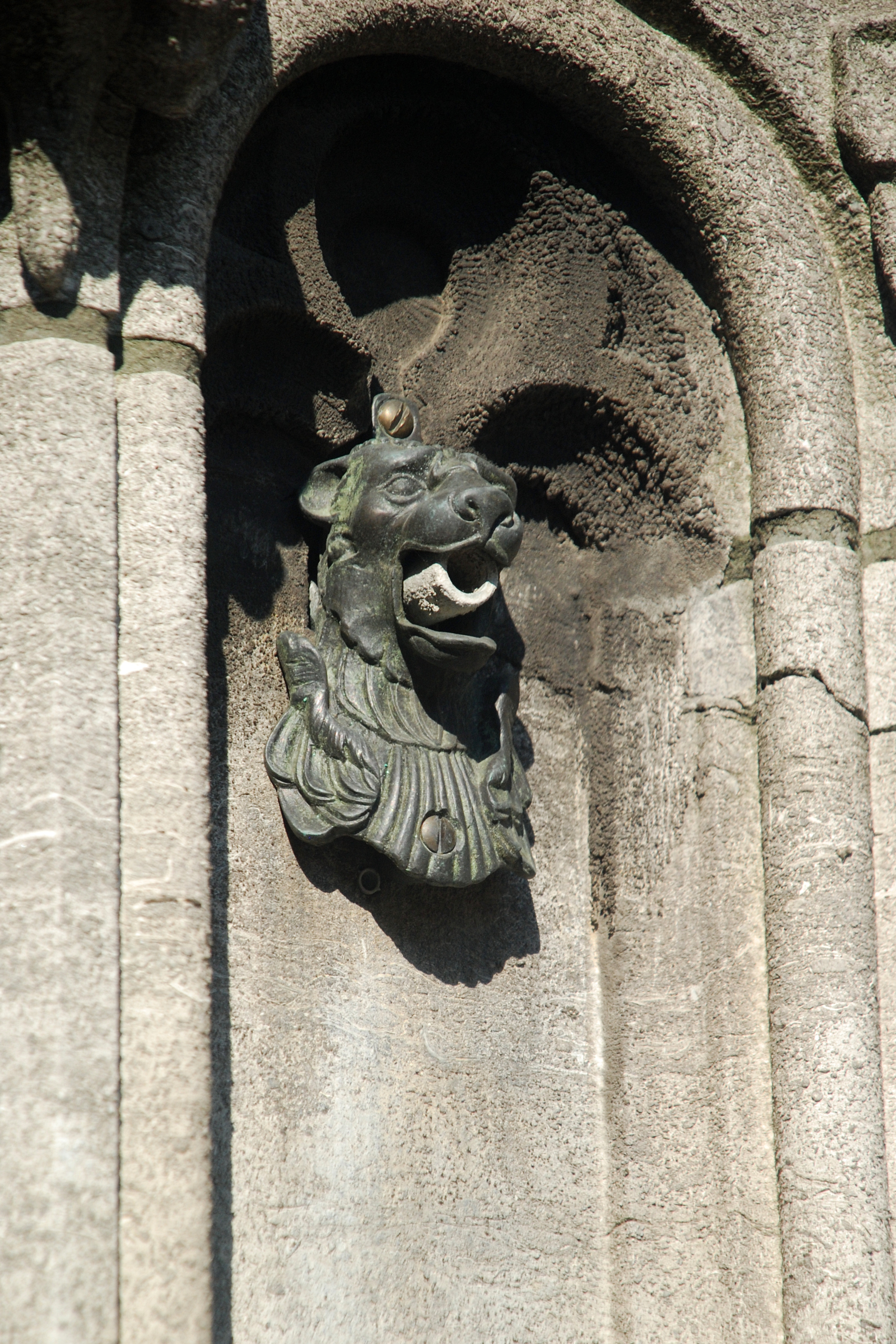 Belgique - Brabant wallon - Fontaine-perron de Nivelles